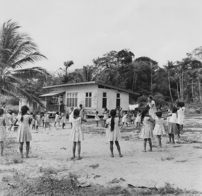 Negatief. Spelende schoolkinderen in Bigiston